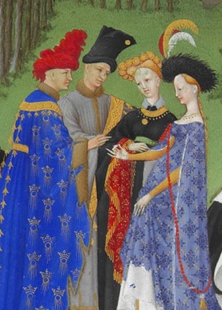 représentation des fiançailles de Marie de Berry, fille du duc de Berry, et de Jean Ier de Bourbon le 27 mai 1400 ou peut-être de Bonne d'Armagnac, avec Charles Ier d'Orléans, neveu de Charles VI, le 18 avril 1410 ?